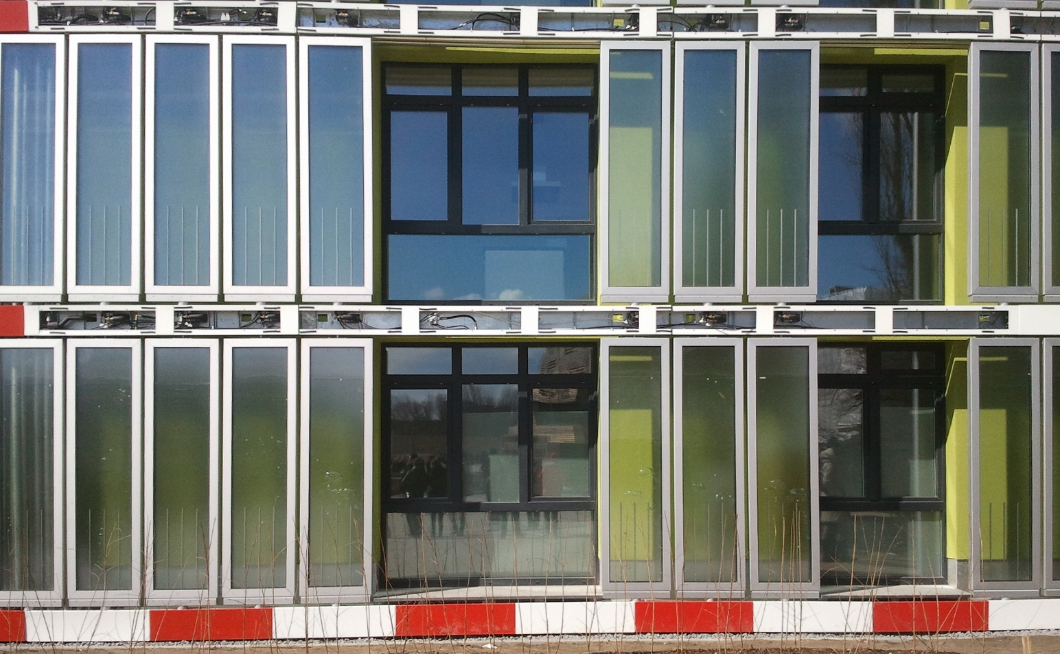 Photobioreaktoren des Algenhauses in Hamburg.